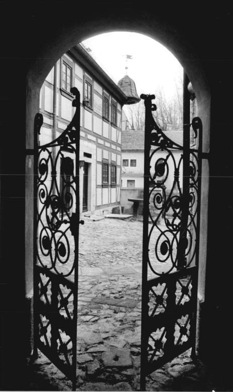 Dresden, Loschwitz, Leonhardi-Museum ADN-ZB Häßler 17.12.1987-Dresden: Museum- Ein Besuch im Leonhardi-Museum in Dresden-Loschwitz lohnt sich. In dem historischen Gebäude mit schön gestalteter Umgebung werden Studioausstellungen des Verbandes Bildender Künstler sowie volkskünstlerische Arbeiten gezeigt. Fördergruppen des Bezirkskabinetts für Kulturarbeit und andere Laienkünstler stellen sich mit ihren Werken vor. (siehe 7 und 8N). Emil August Eduard Leonhardi (* 19. Januar 1828 in Freiberg; † 15. Juli 1905 in Dresden-Loschwitz) war ein deutscher Landschaftsmaler und Sohn des schnell zu Wohlstand gekommenen Dresdner Tintenfabrikanten August Leonhardi (1805–1865). Er erwarb 1879 die ausgediente, ehemaligen Hentschelmühle („Rothe Amsel“) im Dresdner Stadtteil Loschwitz und baute sie u.a. zu einem Atelier um.